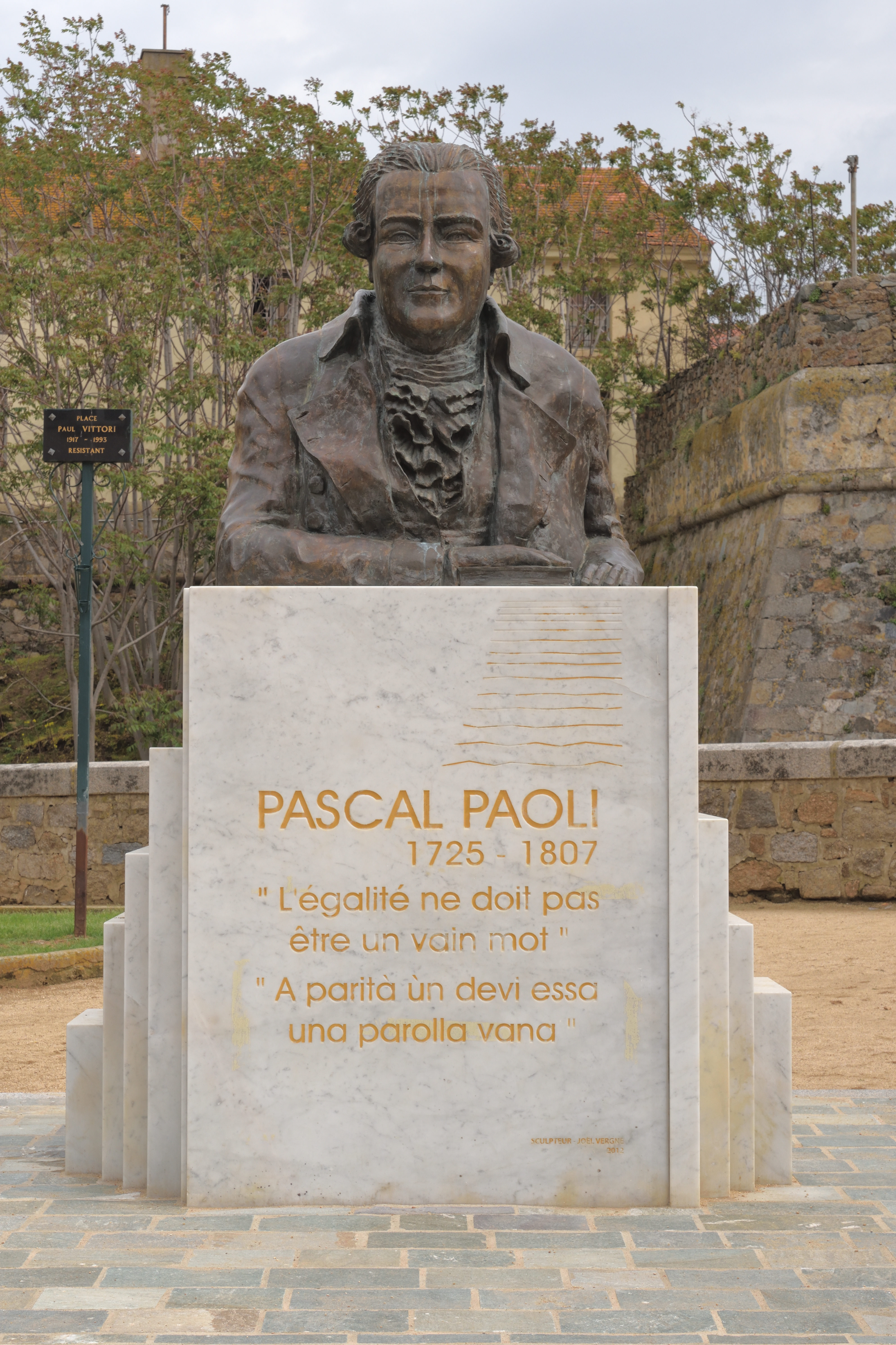 Monument pour Pacal Paoli à Ajaccio